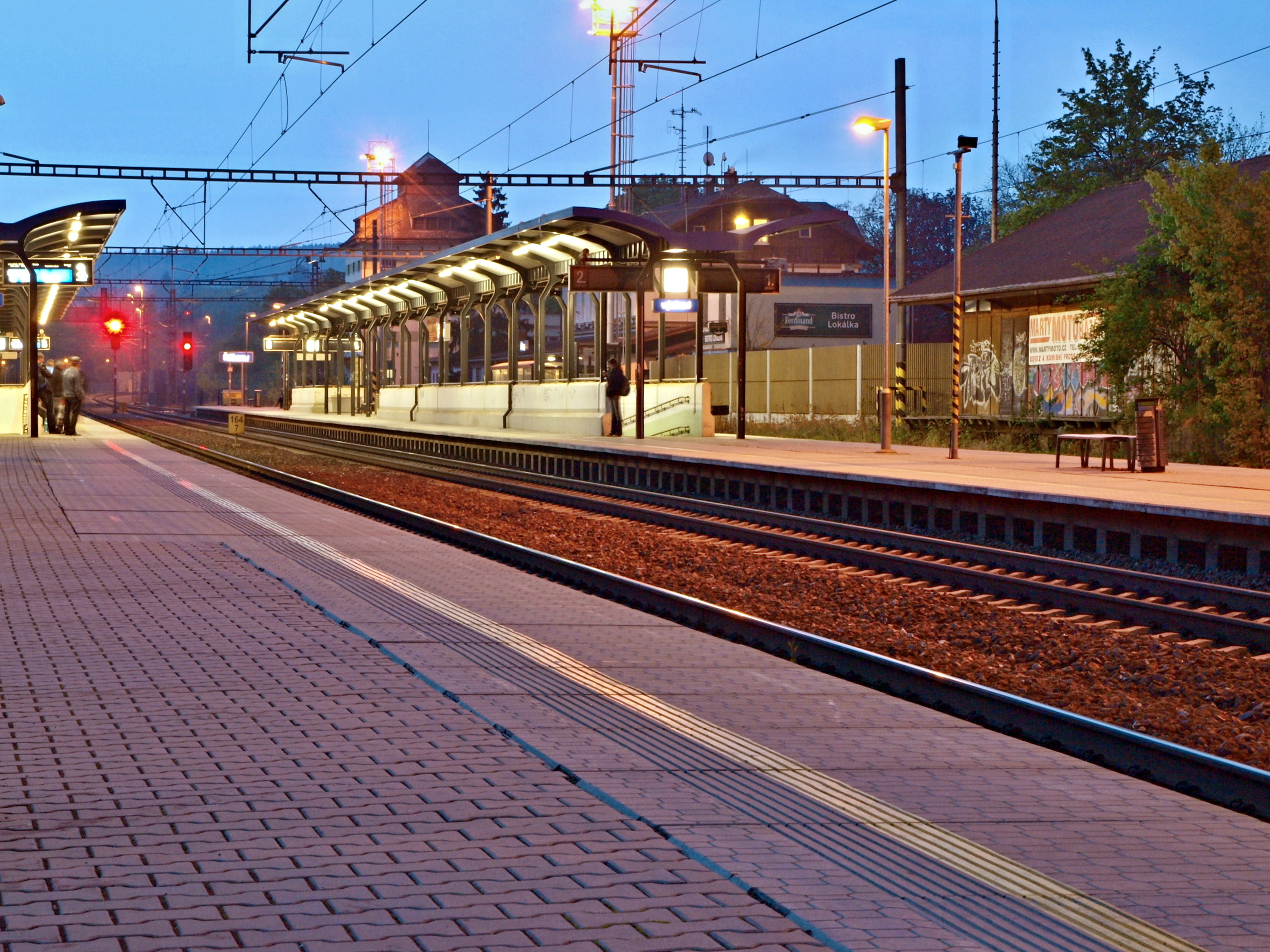 Říčany vlakové nádraží